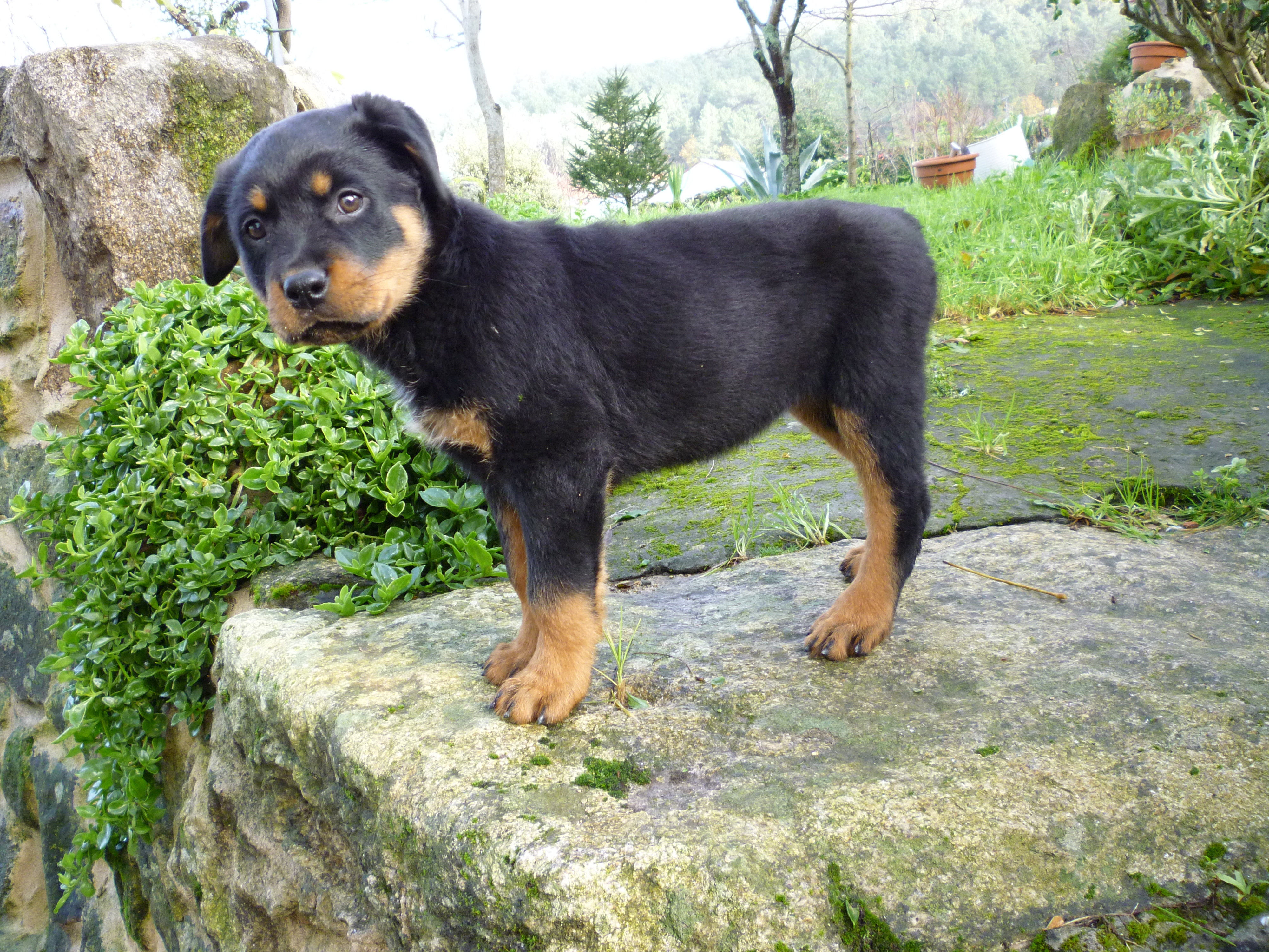 Rottweiler puppy